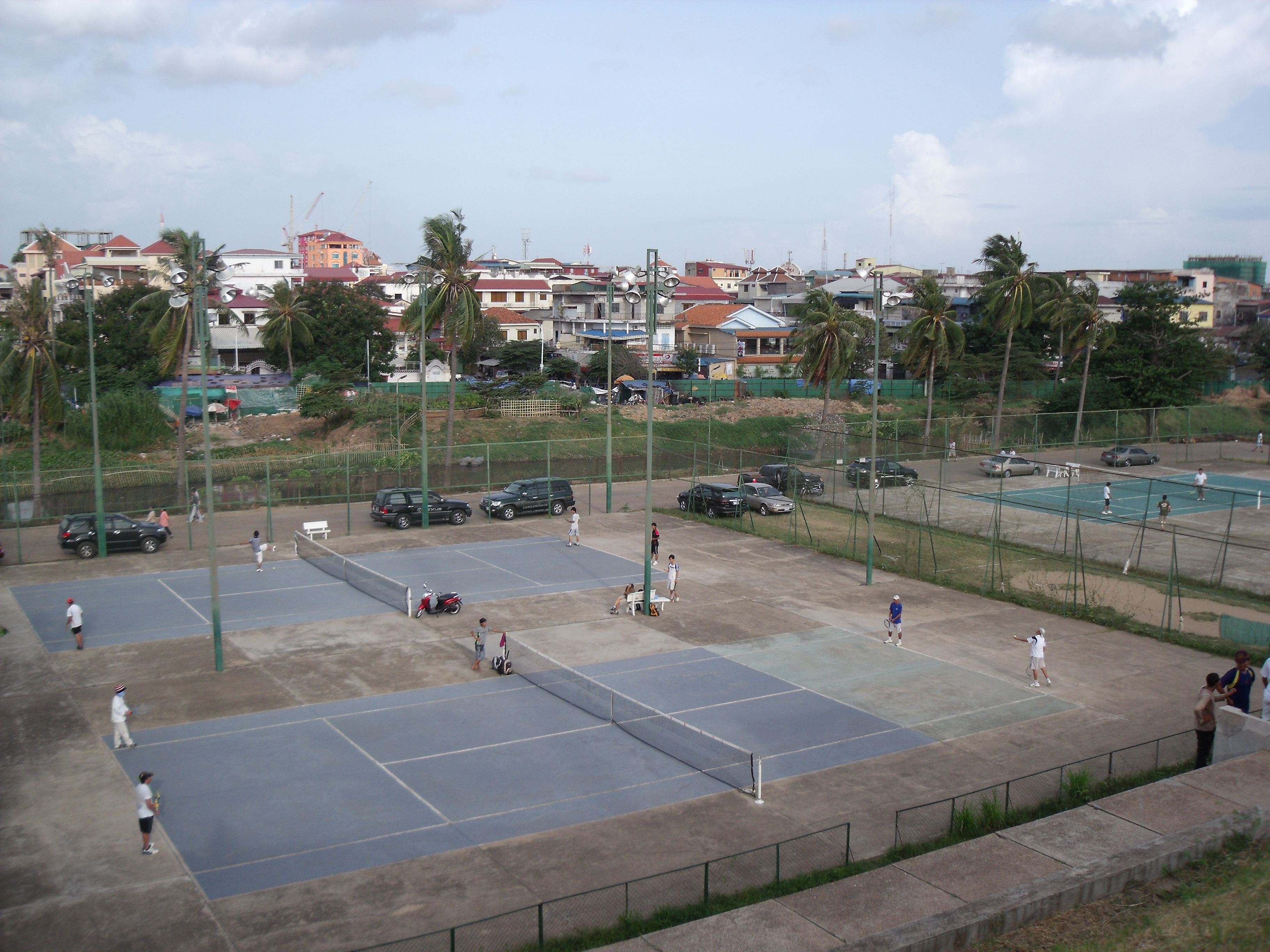 Courts de tennis du stade olympique de Phnom Penh, Cambodge.